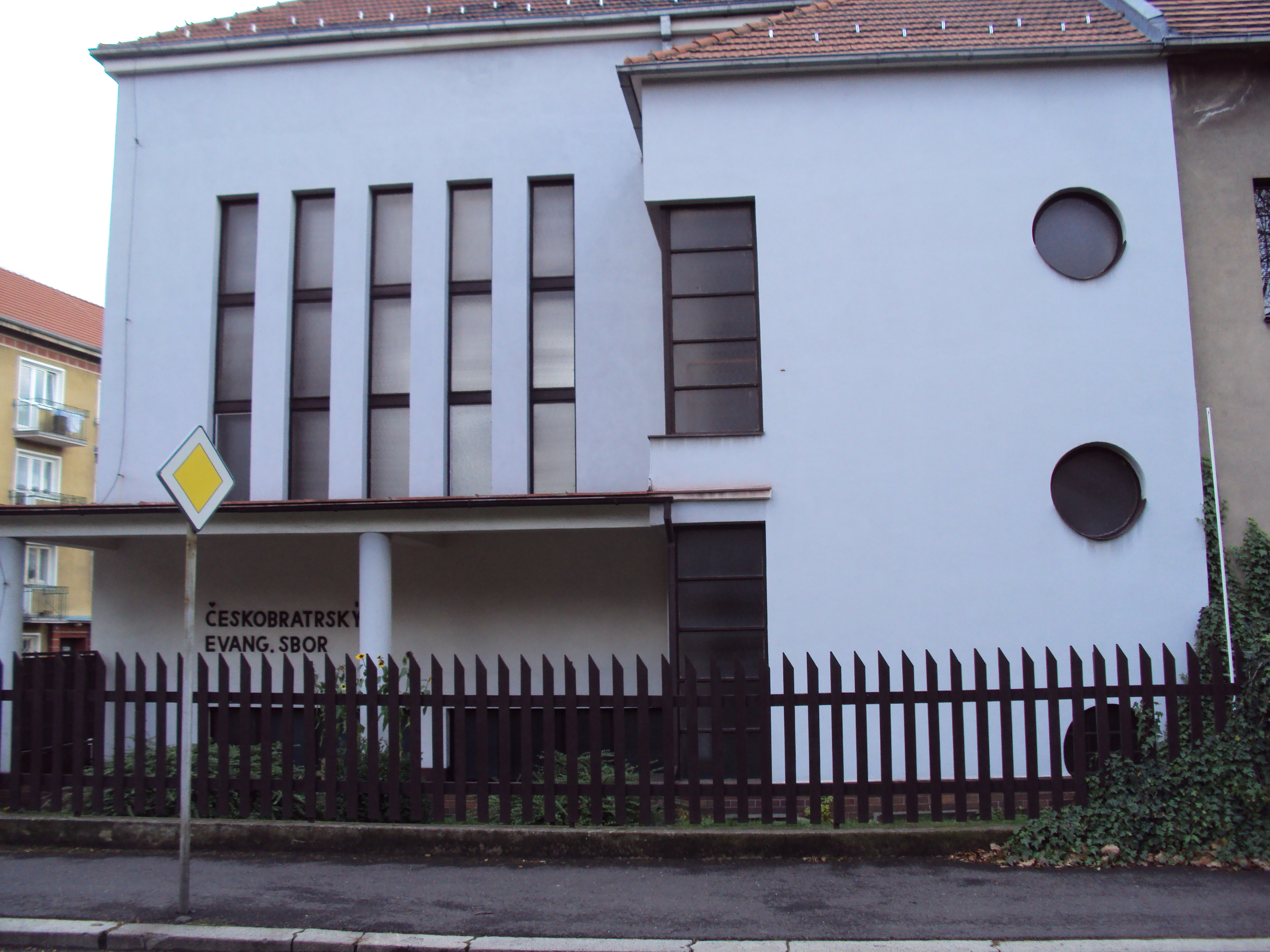 Teplice, Českobratrský evangelický sbor v ulici J. V. Sládka.